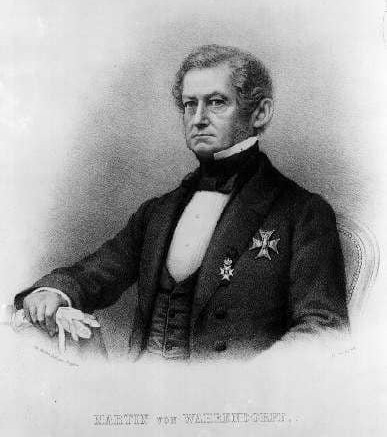 Friherre Martin von Wahrendorff